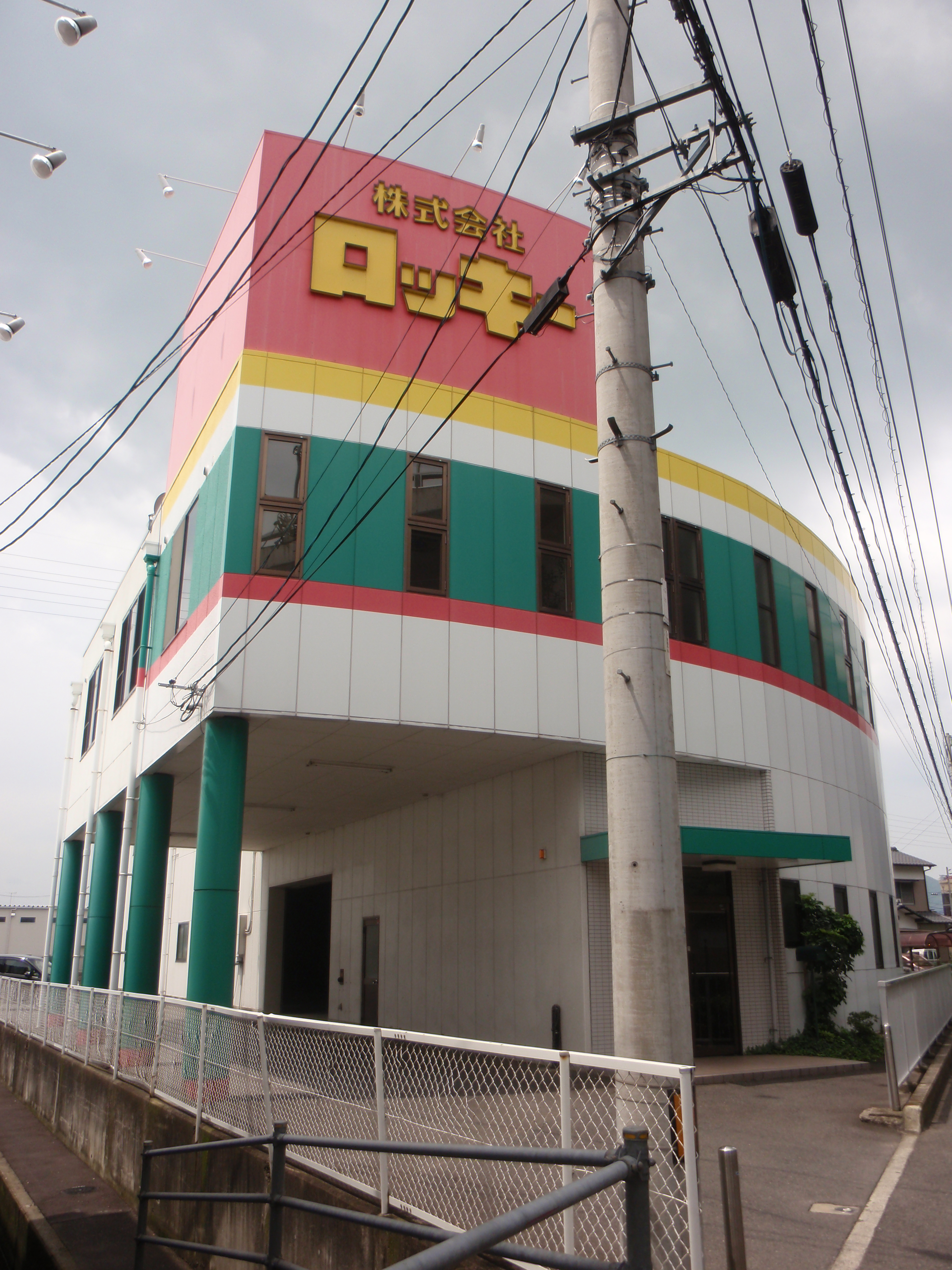 香川県高松市にあるロッキー本社。